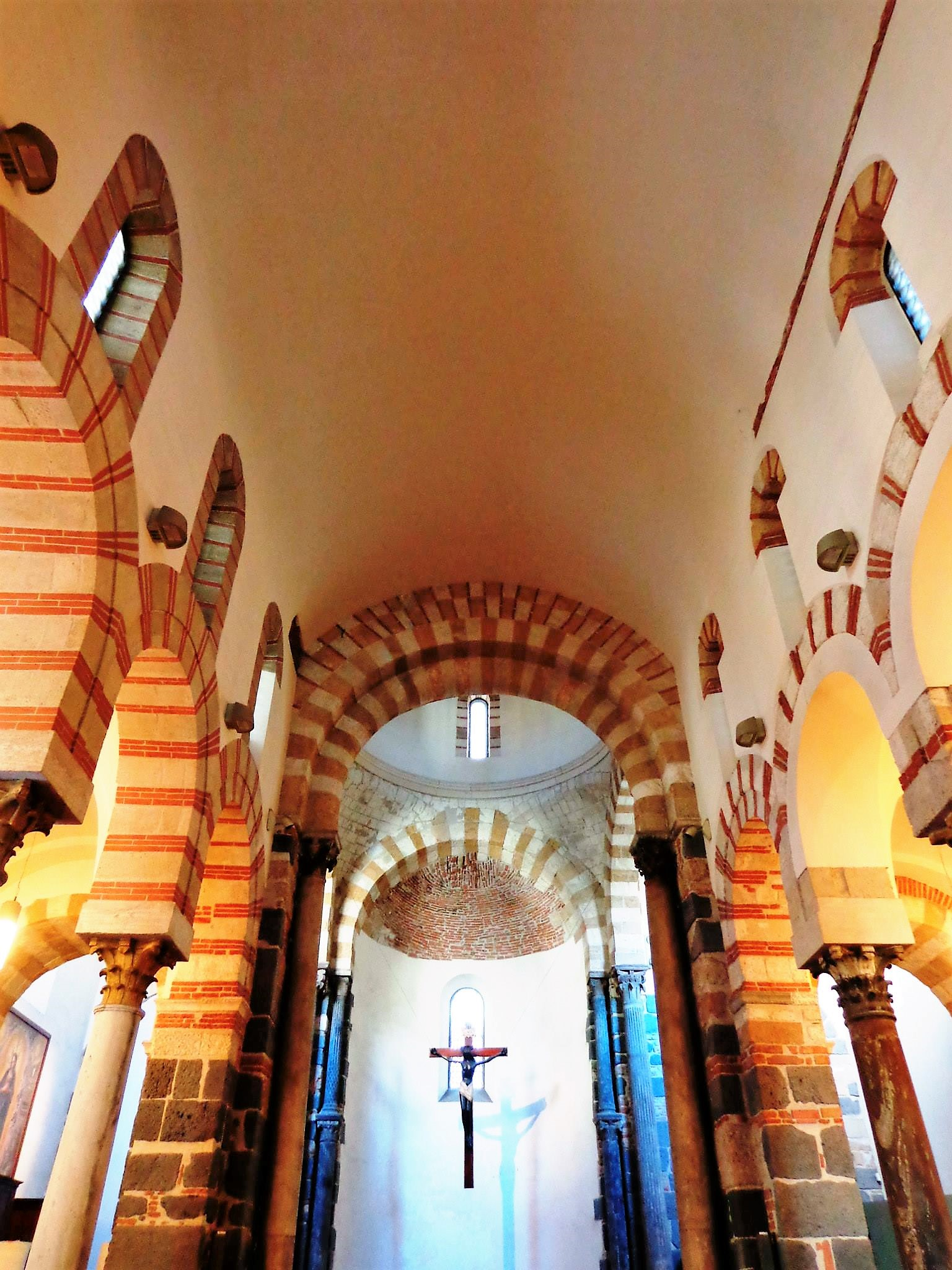 Chiesa dei Catalani